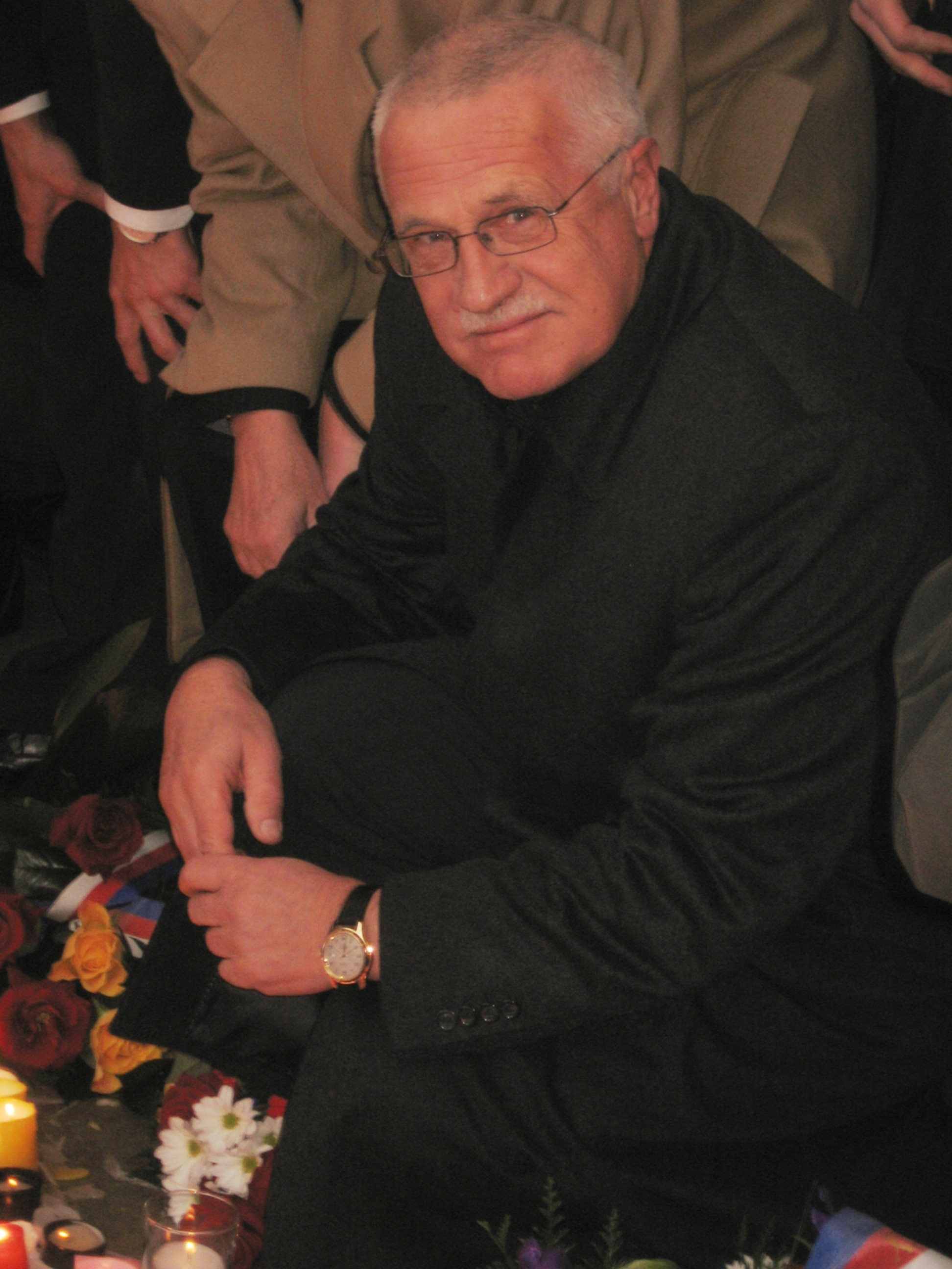 Václav Klaus na Národní třídě 17. listopadu 2006 položil kytici, ochotně zapózoval shromážděným lidem ("Pane prezidente, podívejte se sem", "Pane prezidente a teď se podívejte na nás") a poskytl pár slov různým sdělovacím prostředkům.